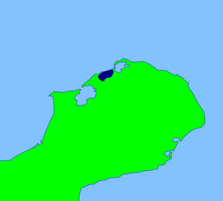 Bahía Honda en azul oscuro, peninsula de Guajira, Colombia.